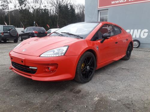 Vue sur la voiture de devant.